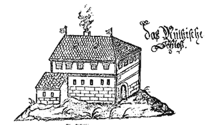 Schloss Kulmain an der Kirche: Gobelsches Schloss in Kulmain